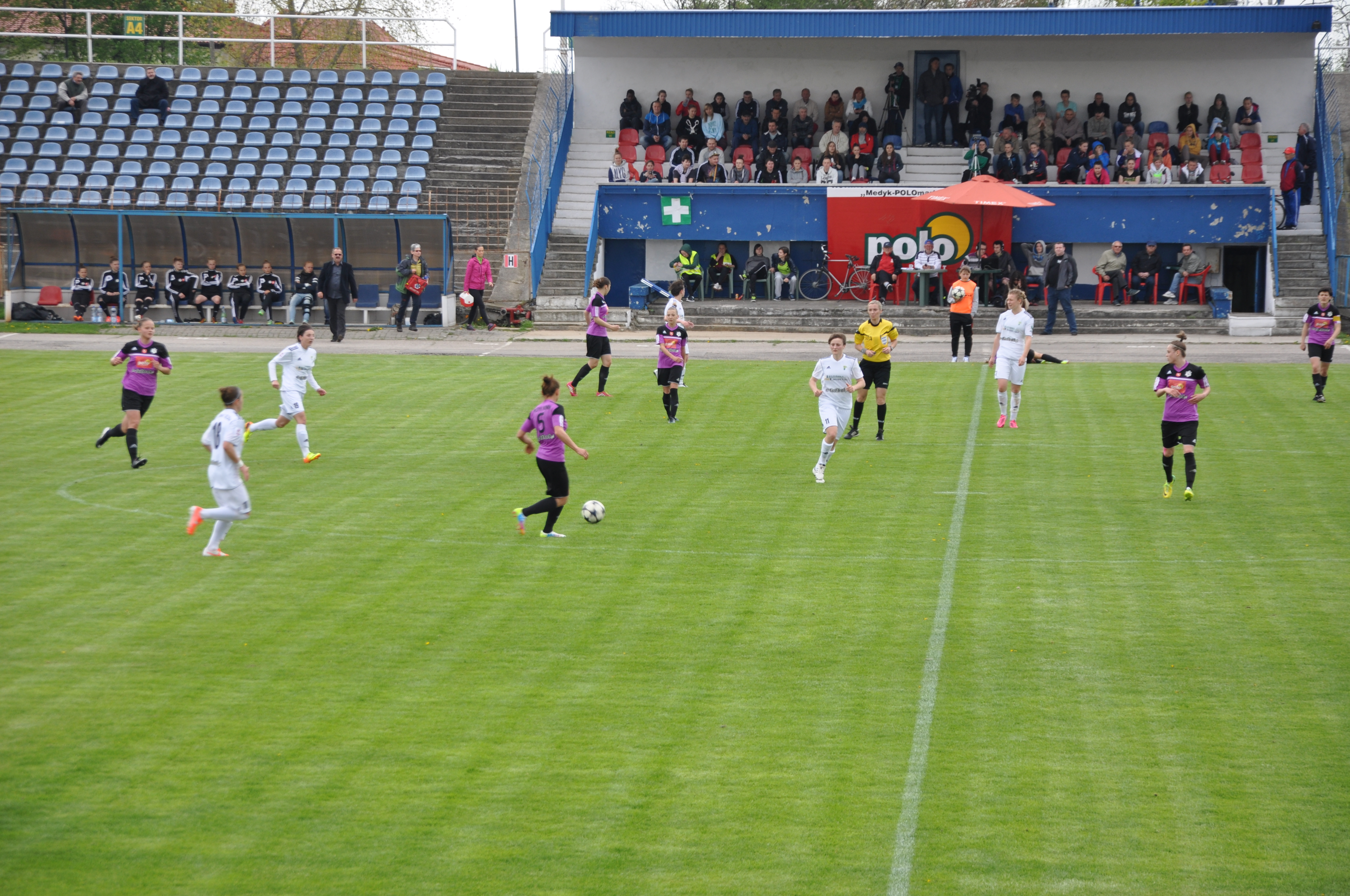 Match retour Konin Leczna 2013-2014